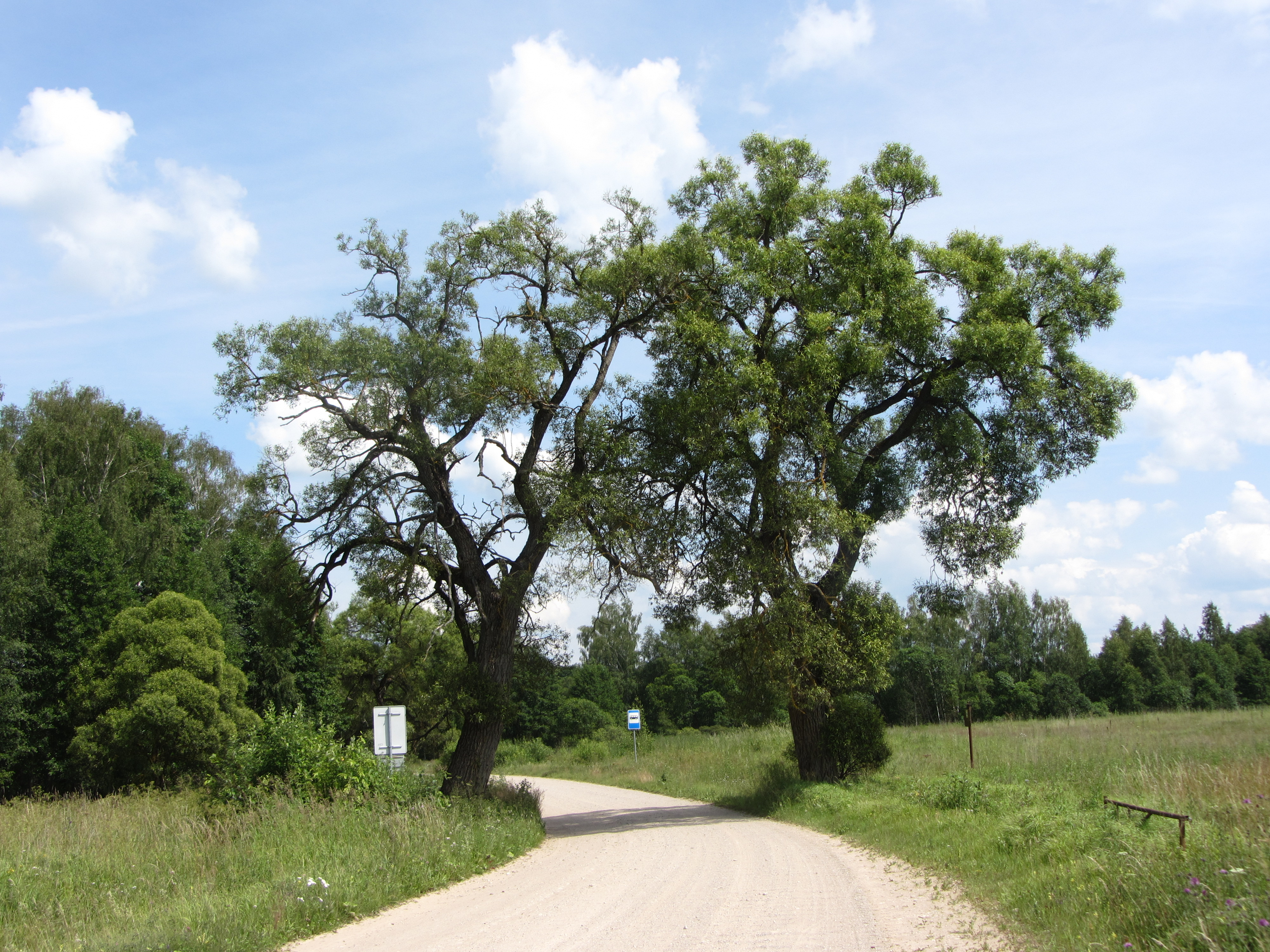 Rimšės sen., Lithuania